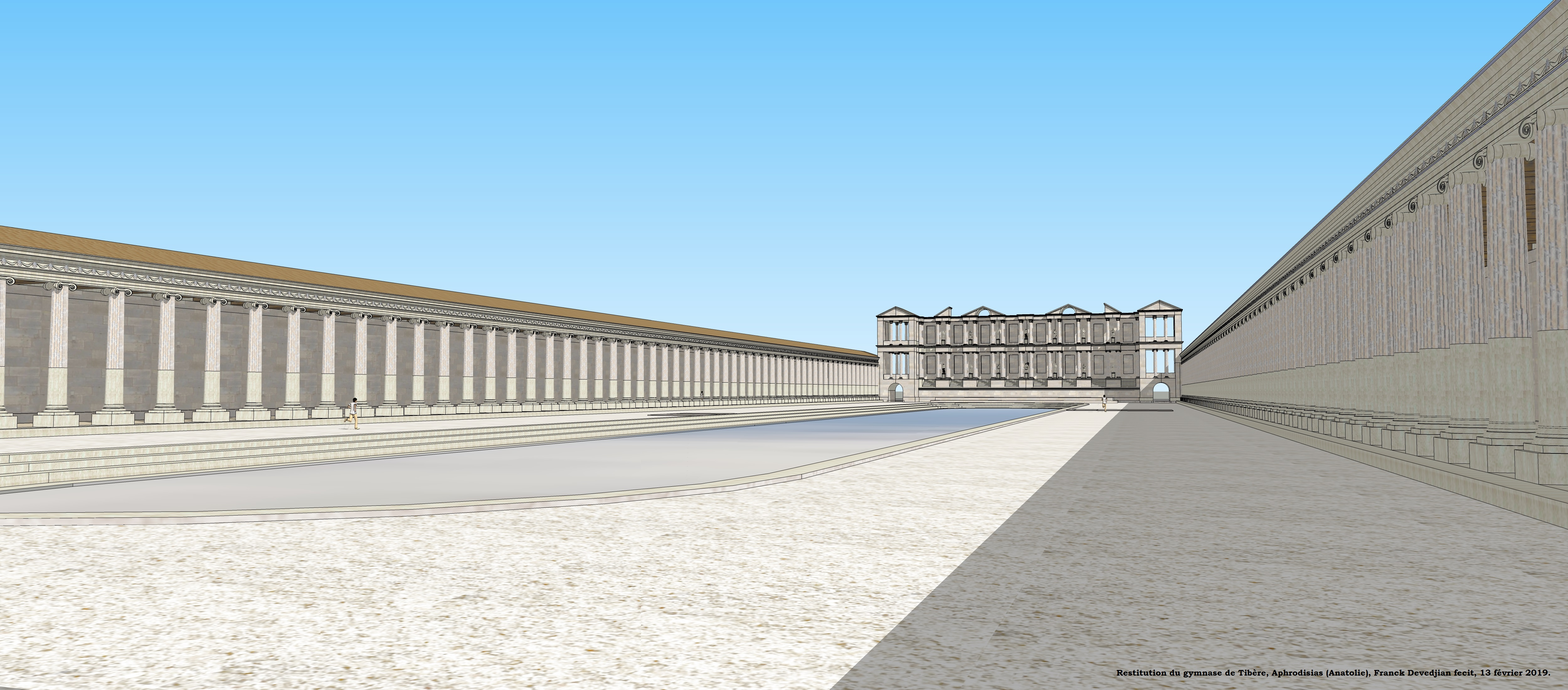 Aphrodisias